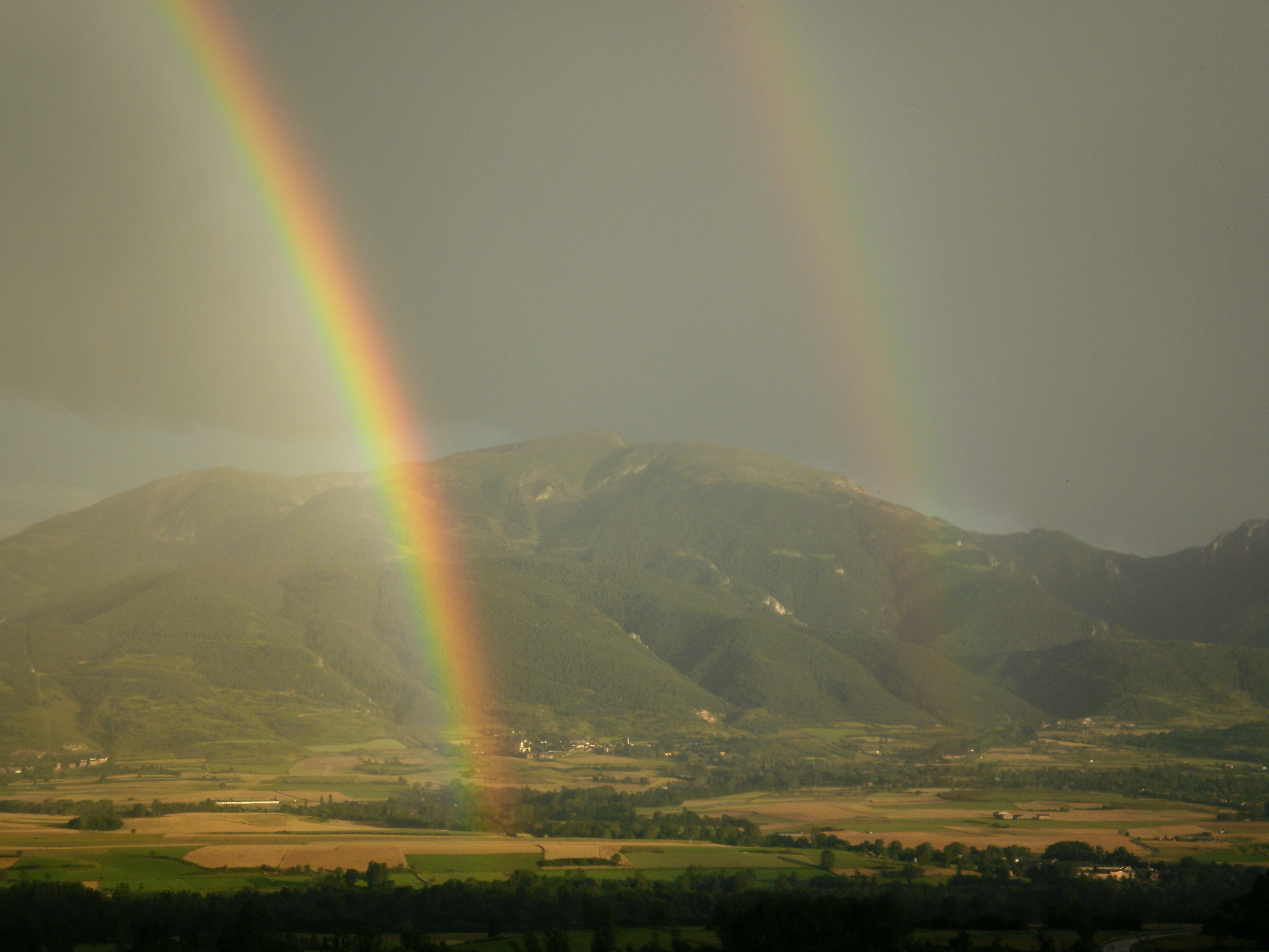 Vista desde Ger a l'estiu . 11/07/2010